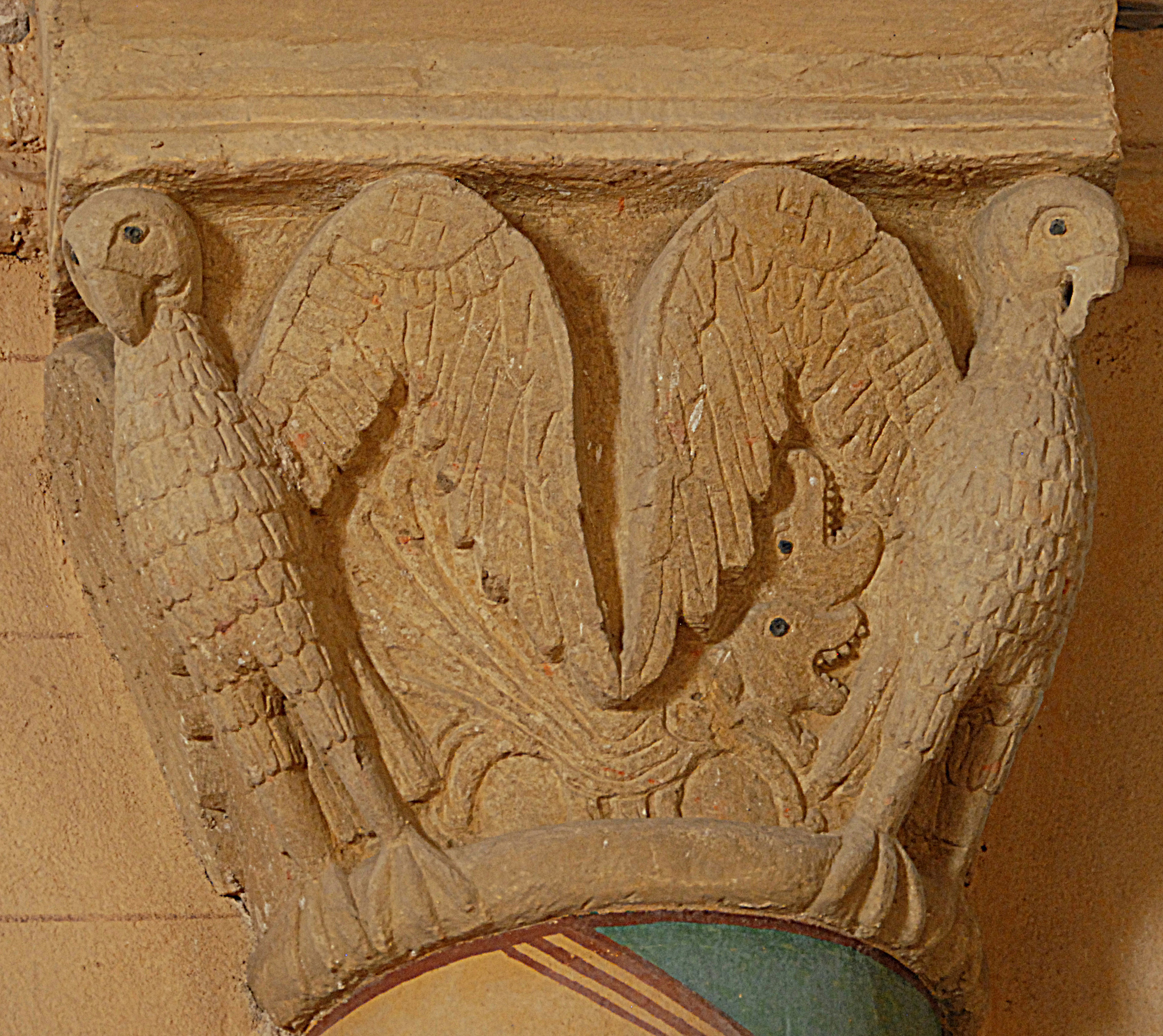 Anzy-le-Duc, Kapitell, "Pelikane" m. Jungen